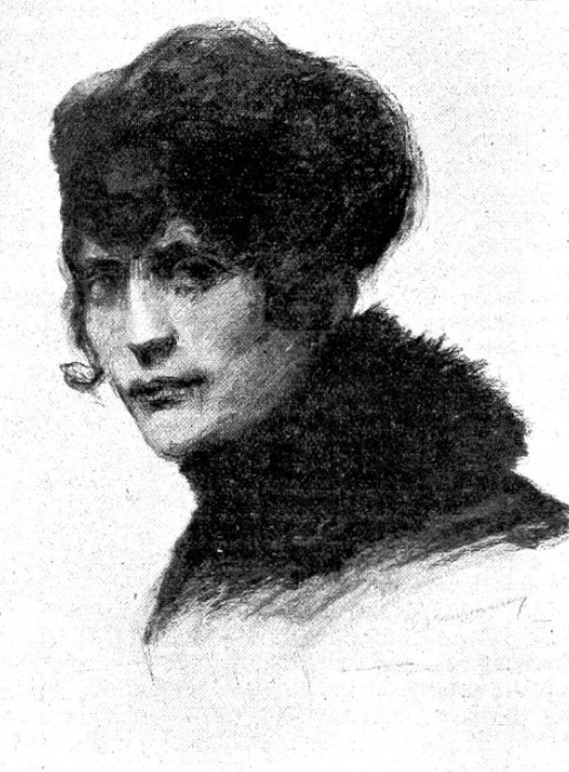 Mariely Beurmann-Brunner (1887–1979)